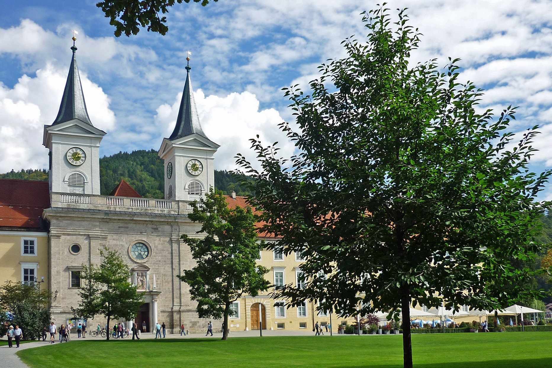 Pfarrkirche St. Quirin in TegernseeThis is a photograph of an architectural monument.